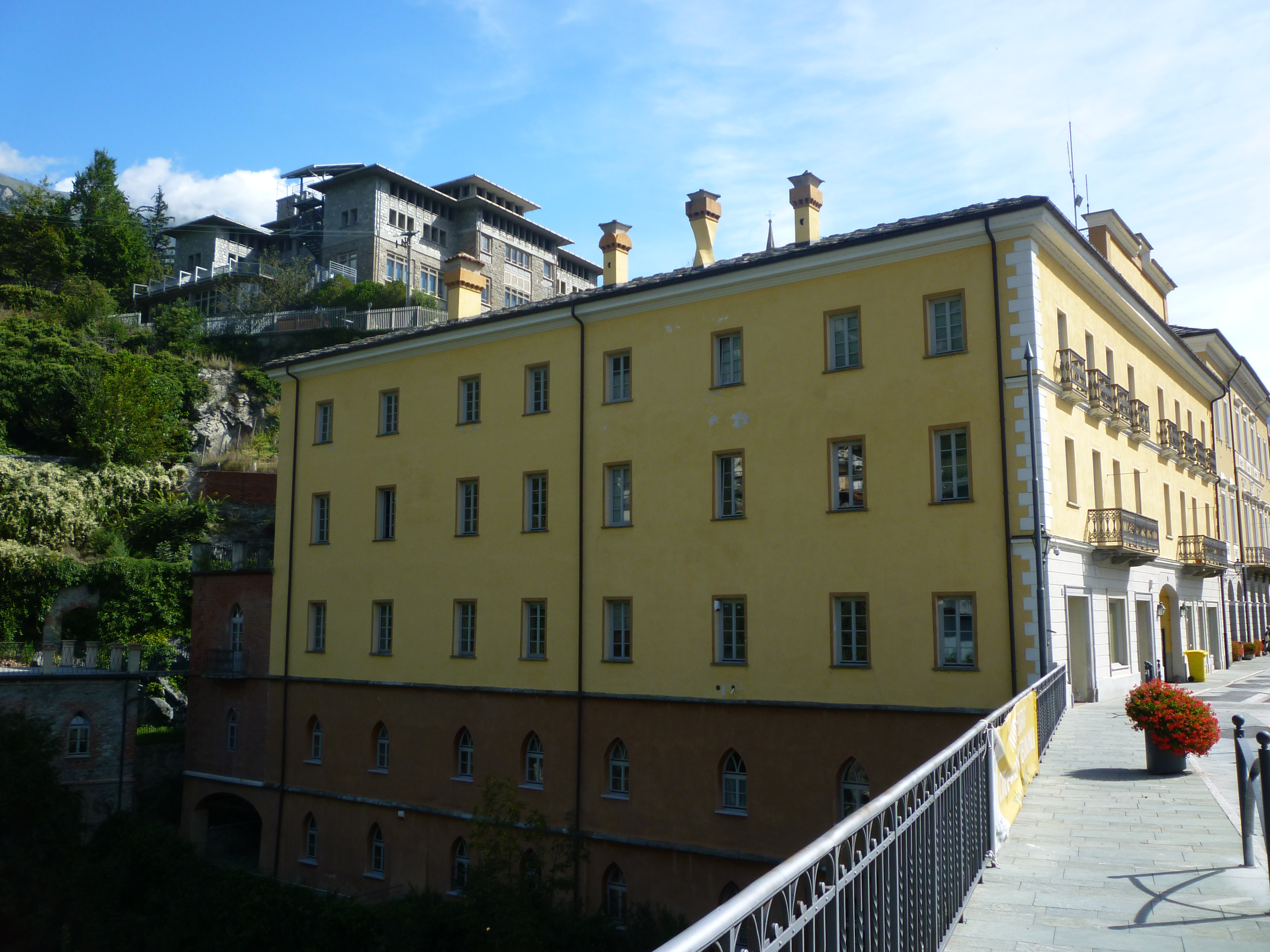 Hôtel Londres à (Châtillon, Vallée d'Aoste)